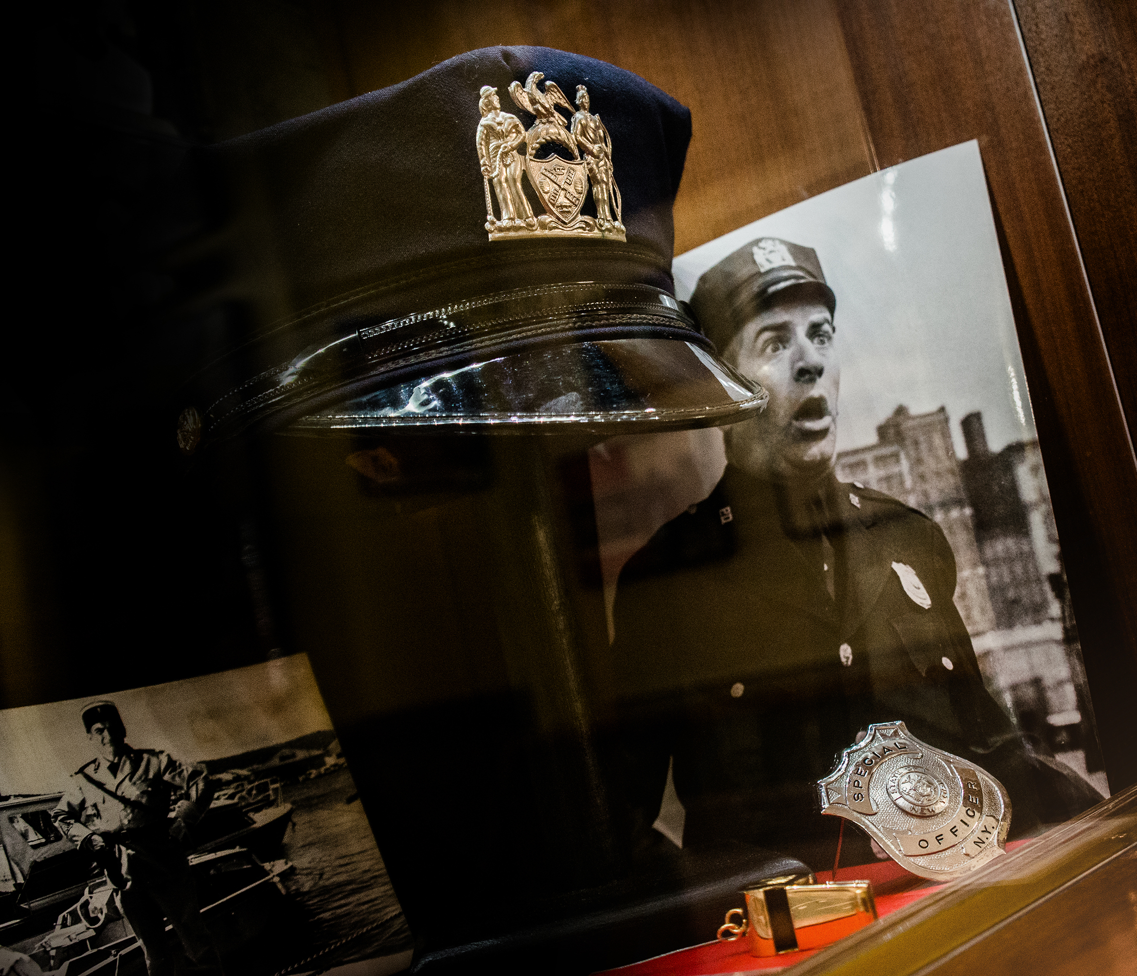 Casquette et insigne de la police de New York arborés par Louis de Funès dans le film Le Gendarme à New York. En bas, un sifflet d'or aux initiales de Louis de Funès. Exposé au Musée Louis de Funès.